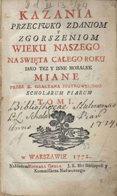 Karta tytułowa dzieła: Kazania przeciwko zdaniom y zgorszeniom wieku naszego, na swięta całego Roku, iako też i inne moralne, miane przez X. Gracyana Piotrowskiego Schol. Piarum. T. I., Warszawa, nakładem Michała Grela (Grölla), 1772.